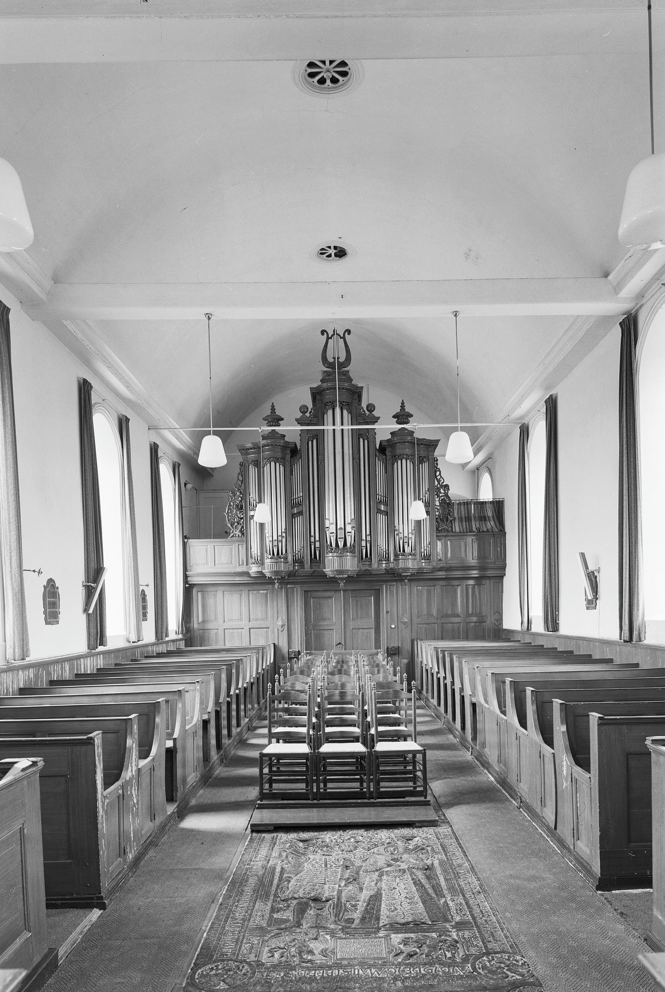 Nederlands Hervormde Kerk: Interieur, overzicht naar het westen